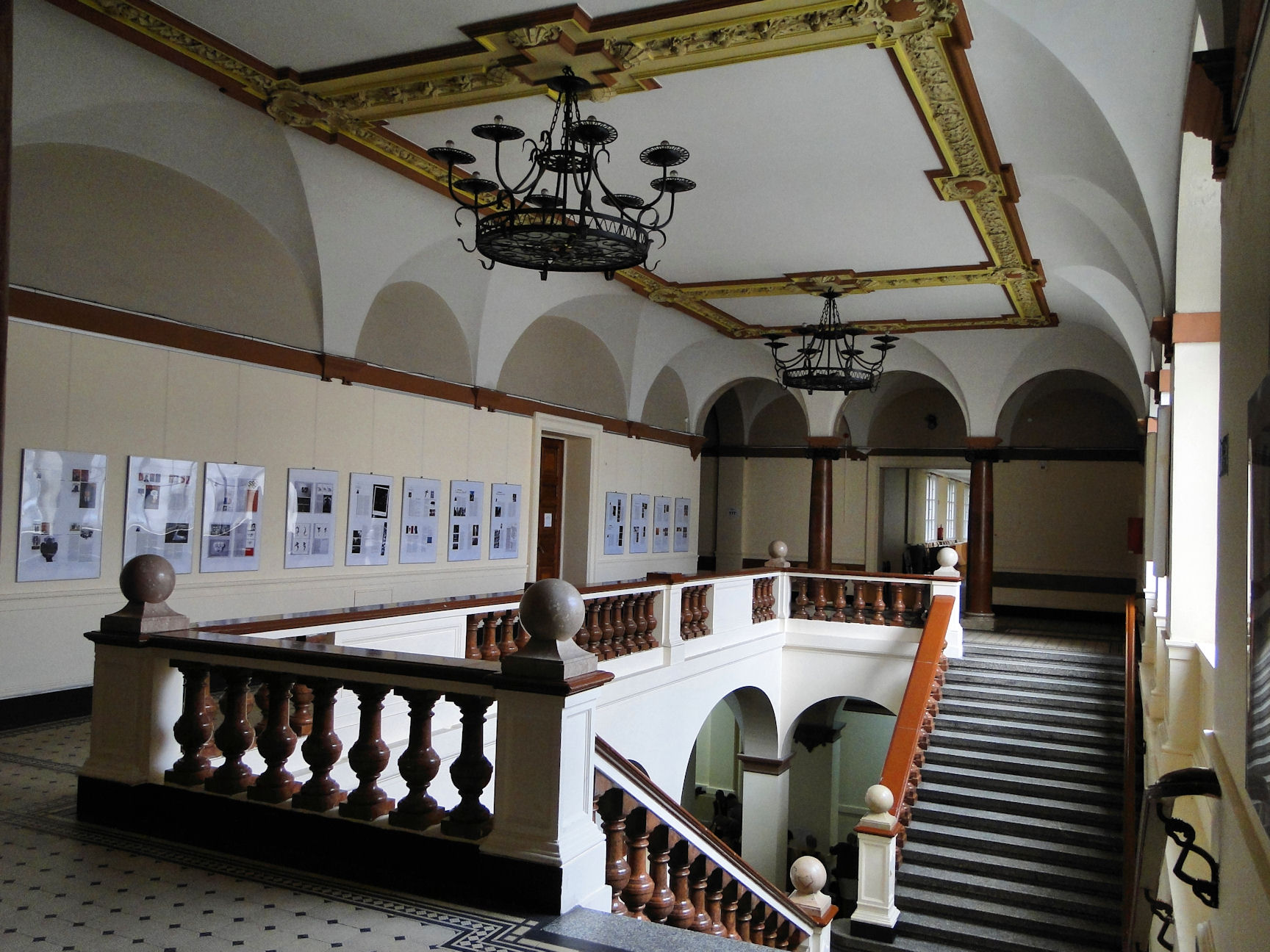 Szczecin Plac Orła Białego 2 - Pałac pod Globusem, 1723 (wnętrze)